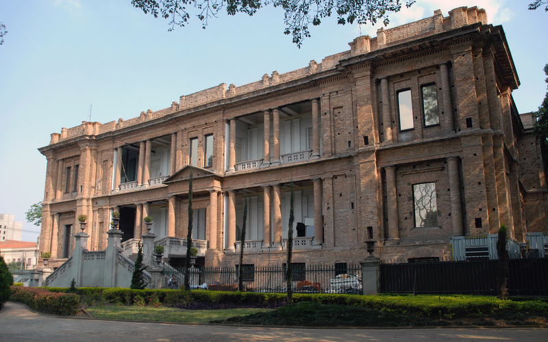 Pinacoteca do Estado de São Paulo